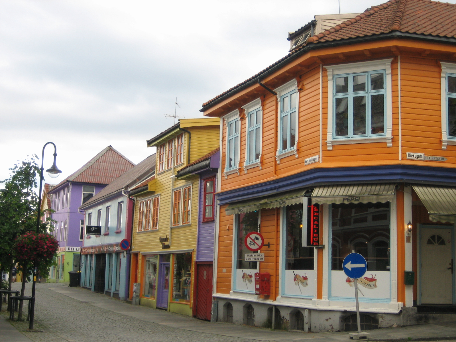 Strooss an der Alstad vu Stavanger. Juli 2007.